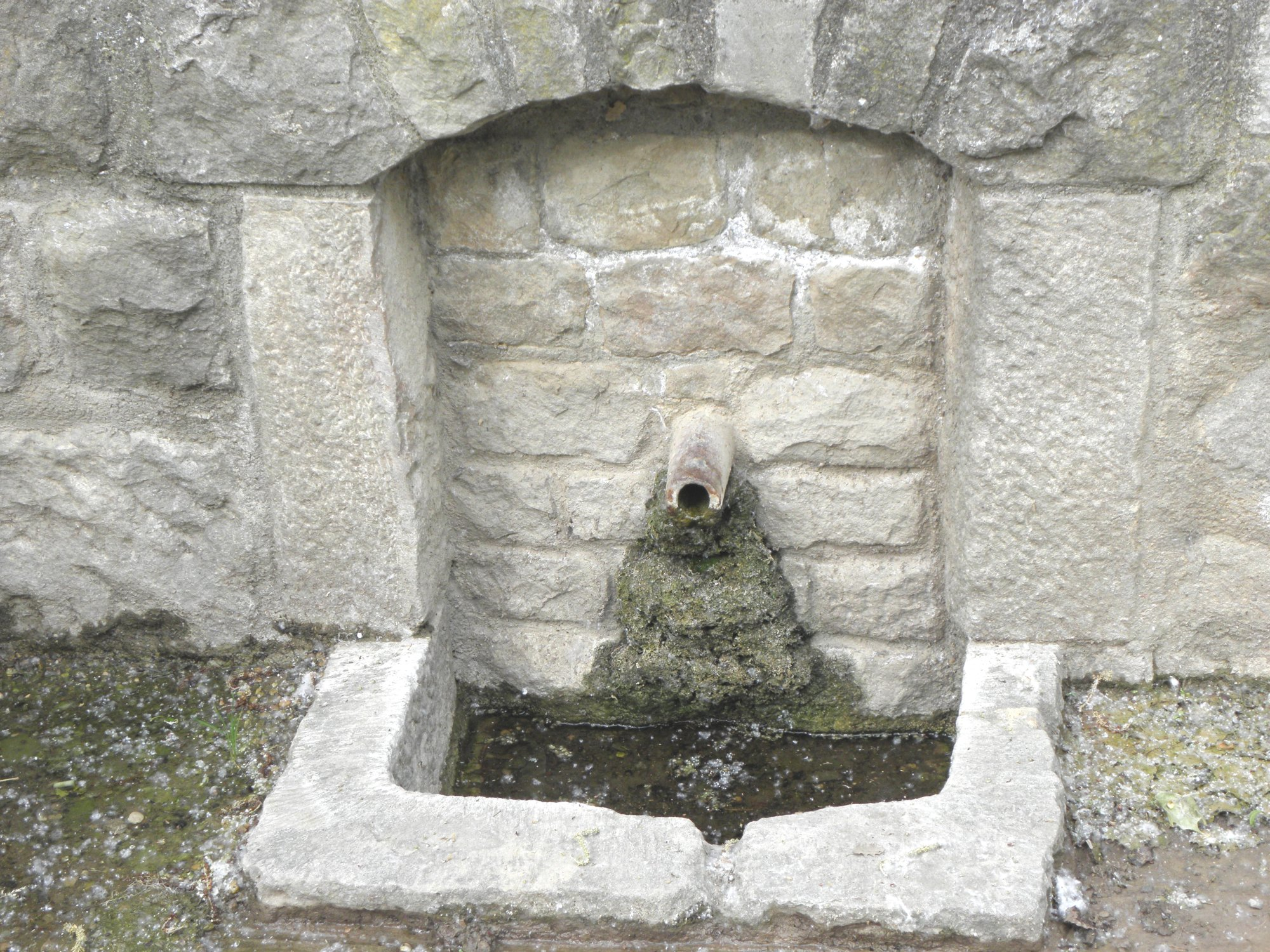 Primer pla de la font canalitzada de la Mare de la Font, al municipi de Solsona (Solsonès)